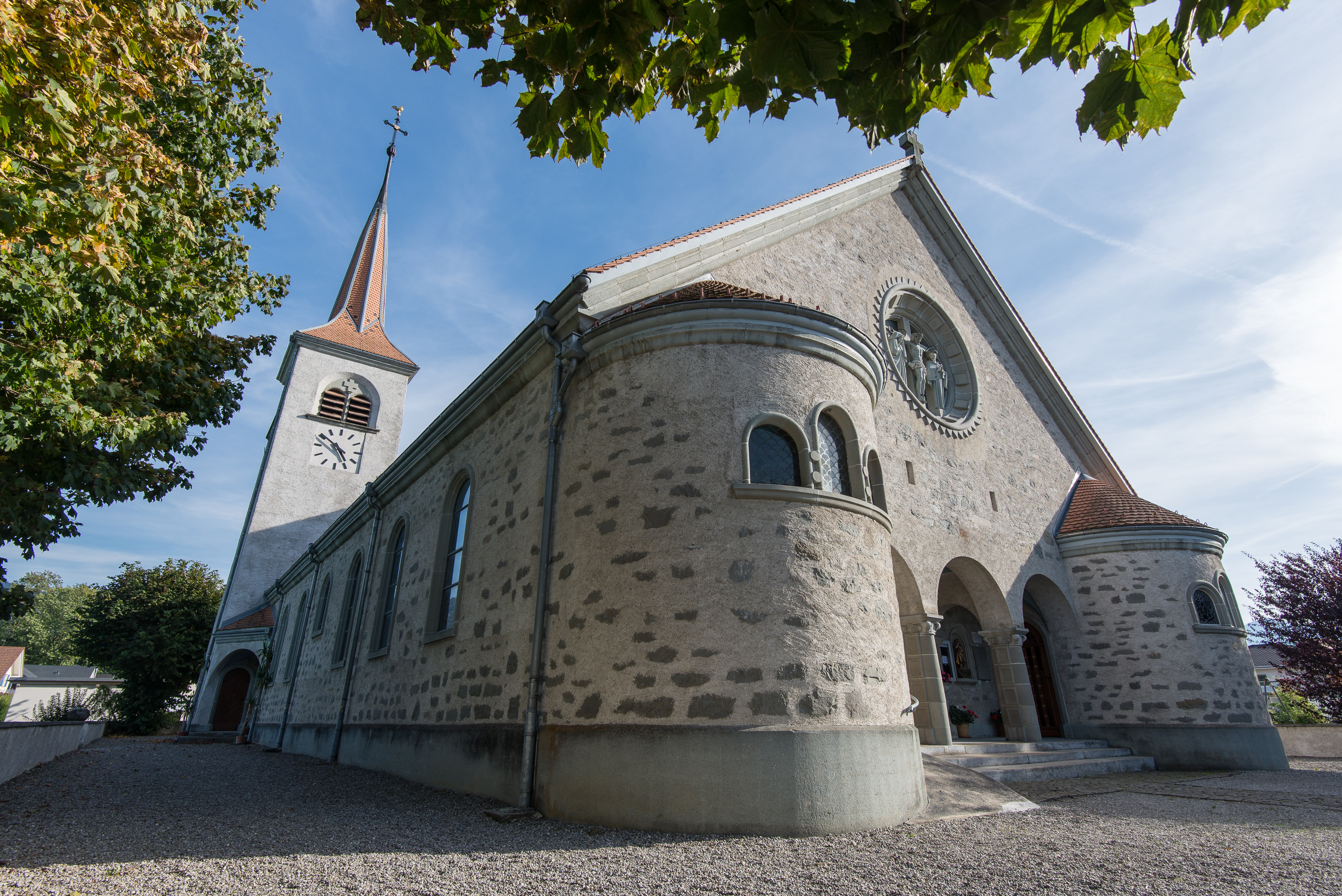 Eglise Notre-Dame de l'Assomption Echarlens